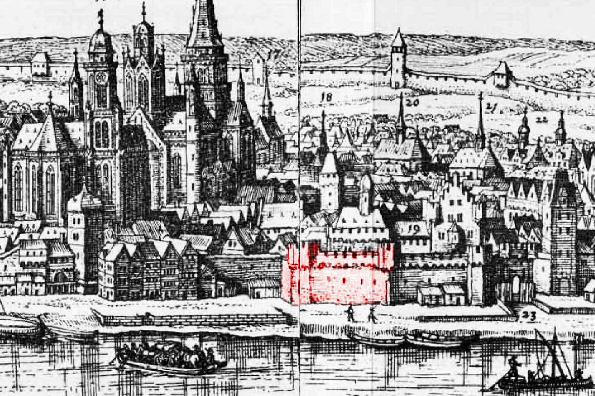 links der Mainzer Dom, in der Bildmitte (rot markiert) das Heilig-Geist-Spital um 1633 (Detail einer Stadtansicht aus der Topographia Archiepiscopatuum Moguntinensis, Trevirensis et Coloniensis von Matthäus Merian dem Jüngeren).